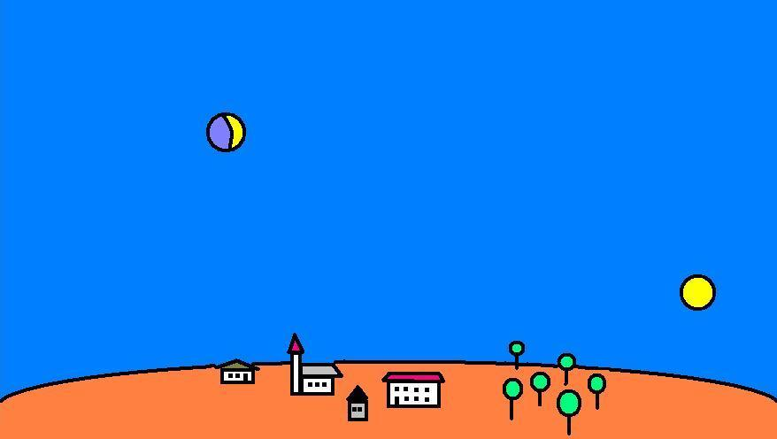 Bild der "Mondtäuschung 2"